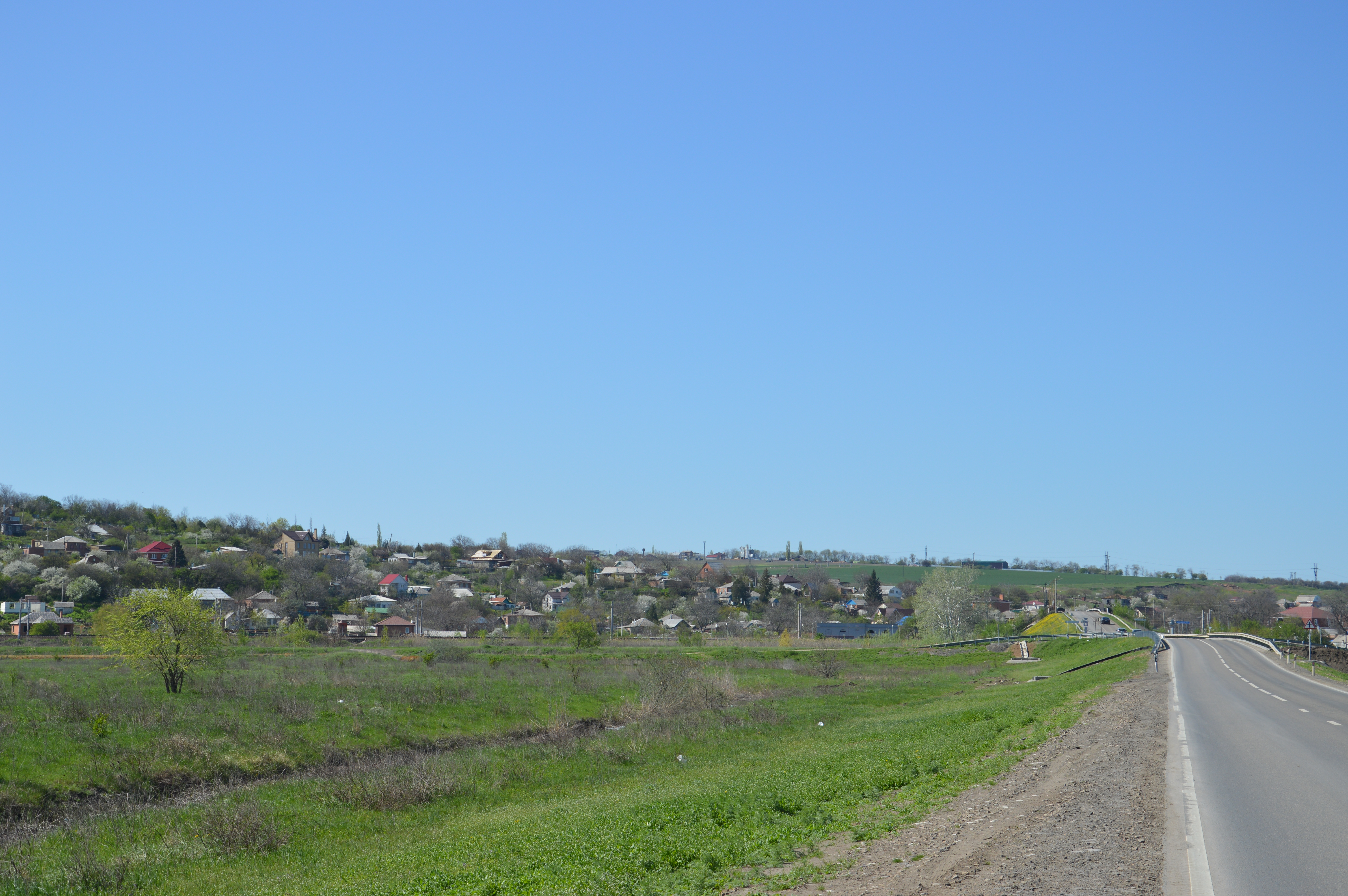 Хутор в Аксайском районе Ростовской области